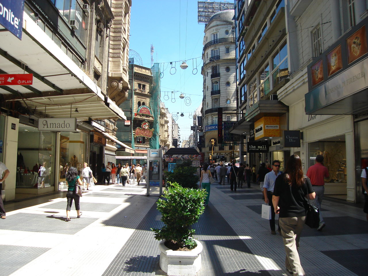 Vista hacia el sur de la Calle Florida, entre Córdoba y Paraguay.